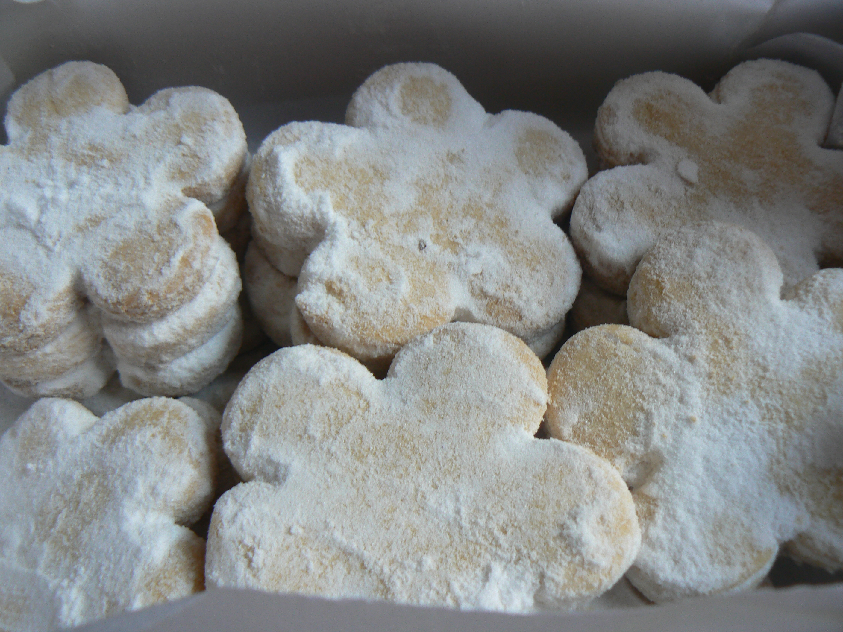 Pastissets tipics de Menorca, especialitat d'Alaior.